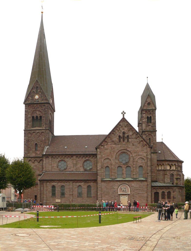 St. Martin (Nörten-Hardenberg mit neu gestaltetem Stiftsplatz)